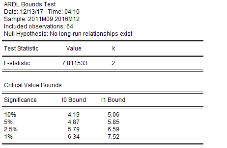 Koentegrasyon sınır testi sonuçları